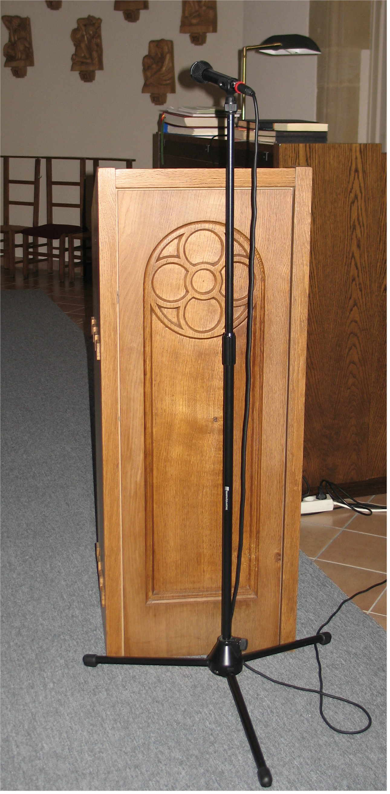 Ambo an der Kapell zu Bouferdeng.